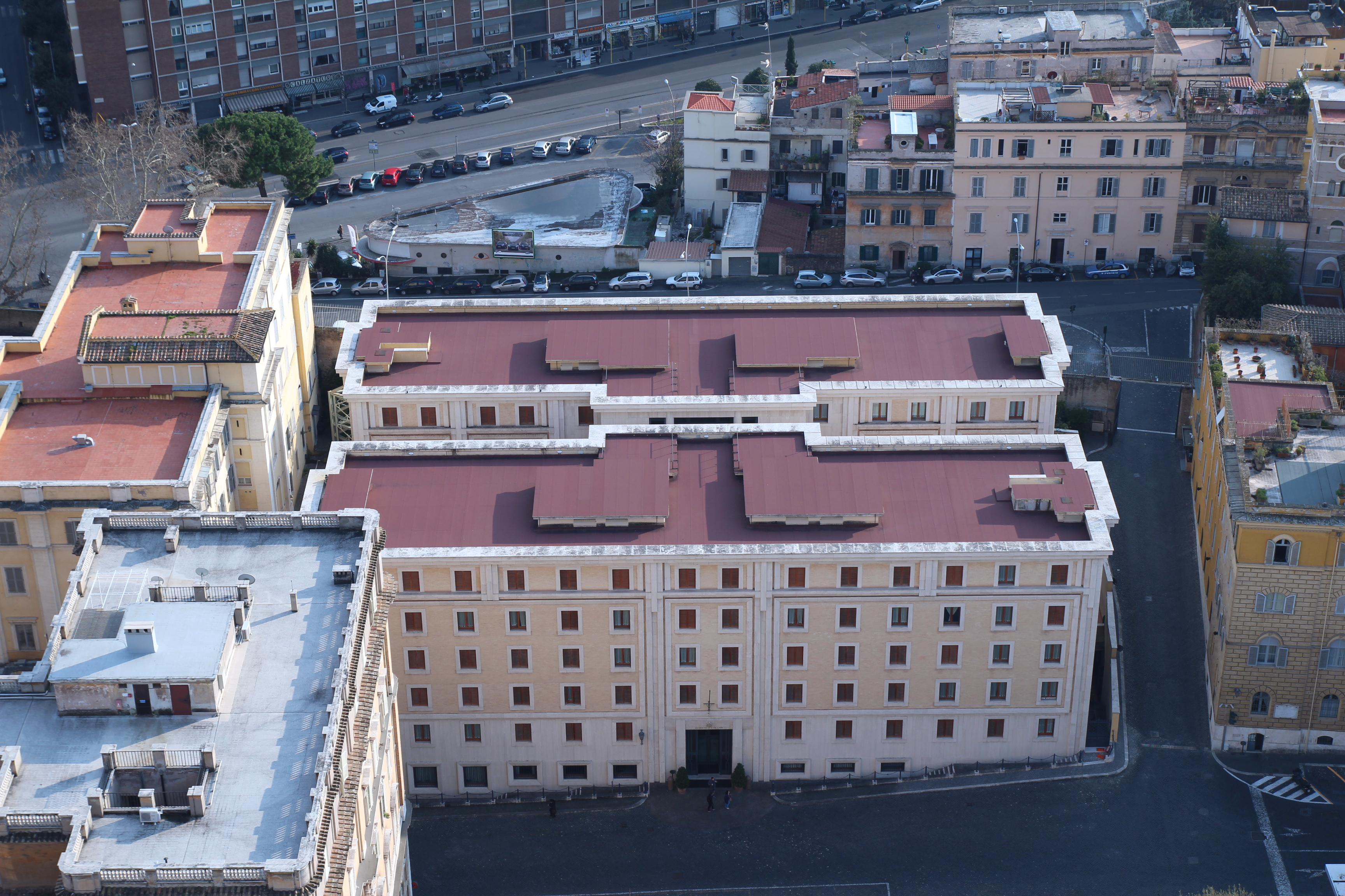 Domus Sanctae Marthae von der Kuppel des Petersdoms